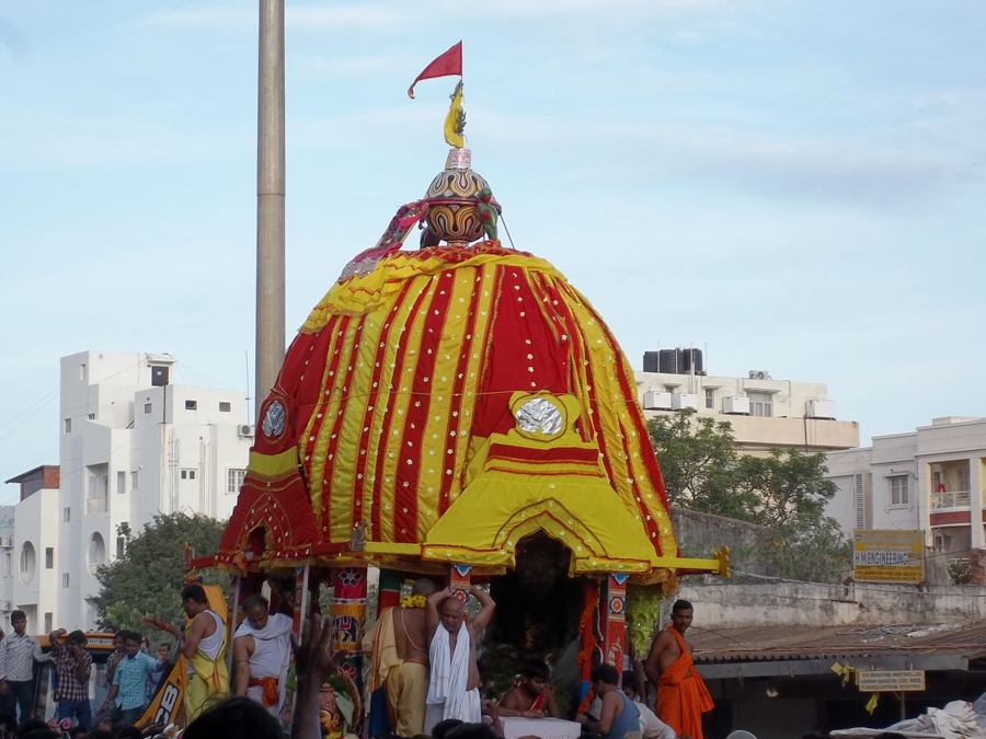 ଜଗନ୍ନାଥ ଜଣେ ପୁରୀ ଦେବତା ଓ ବୁଦ୍ଧ ରୂପରେ ପୂଜା ପାଇଥାନ୍ତି । ପ୍ରାୟ ଏକ ସହସ୍ରାବ୍ଦୀ ଧରି ବର୍ଷର ବାର ମାସରୁ ଏଗାର ମାସ ହିନ୍ଦୁ ଦେବତା ବିଷ୍ଣୁ ରୂପରେ ଓ ଏକ ମାସ ଛଦ୍ମ ଭାବେ ବୁଦ୍ଧ ରୂପରେ ଶ୍ରୀ ଜଗନ୍ନାଥ ପୂଜା ପାଇ ଆସୁଛନ୍ତି । ତେବେ ଶ୍ରୀ ଜଗନ୍ନାଥଙ୍କୁ ଜାତି, ଧର୍ମ ଓ ବର୍ଣ୍ଣ ନିର୍ବିଶେଷରେ ସମସ୍ତେ ପୂଜା କରିବା ଦେଖାଯାଏ । ଏହି ଛବିଟି ବେଙ୍ଗାଳୁରୁର ଜଗନ୍ନାଥ ମନ୍ଦିରରେ ପୂଜିତ ଜଗନ୍ନାଥ, ବଳଭଦ୍ର, ସୁଭଦ୍ରା ଓ ସୁଦର୍ଶନଙ୍କ ରଥଯାତ୍ରା ବେଳର । This media file is uploaded with Odia loves Wikipedia This is the picture is taken during Ratha Jatra, 2011 Jagannath temple, Bengaluru, India.